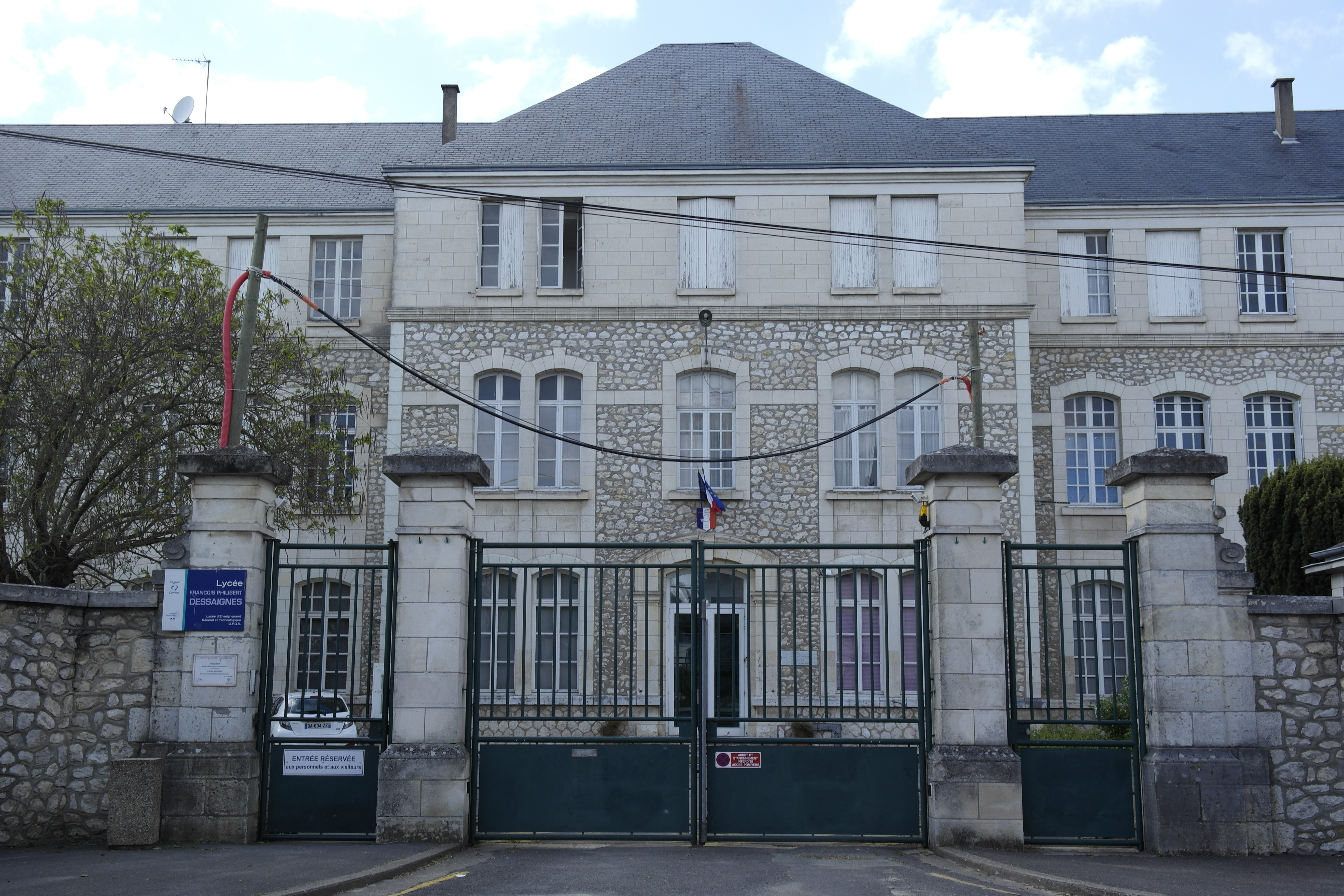 Construit grâce à un legs du député et philanthrope François-Philibert Dessaignes, l'hospice Dessaignes abrite aujourd'hui le lycée du même nom.